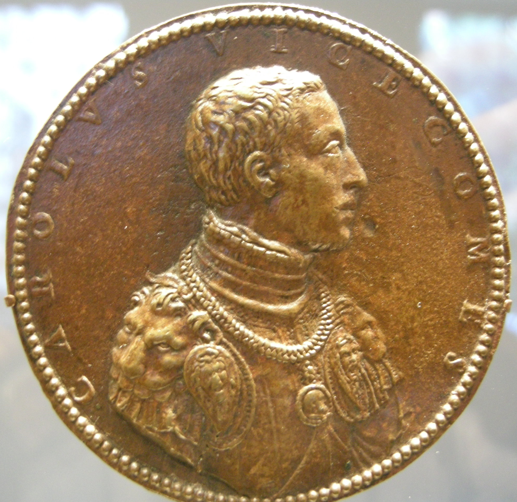 Artista italiano del XVI sec., Carlo Visconti (1523-1565)